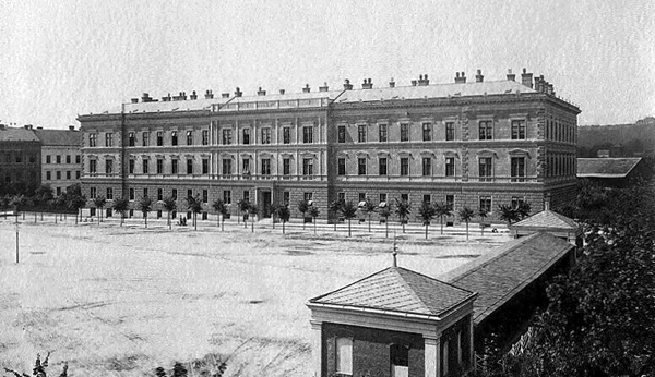 Pohled na Zemskou porodnici na Obilním trhu v Brně z roku 1902